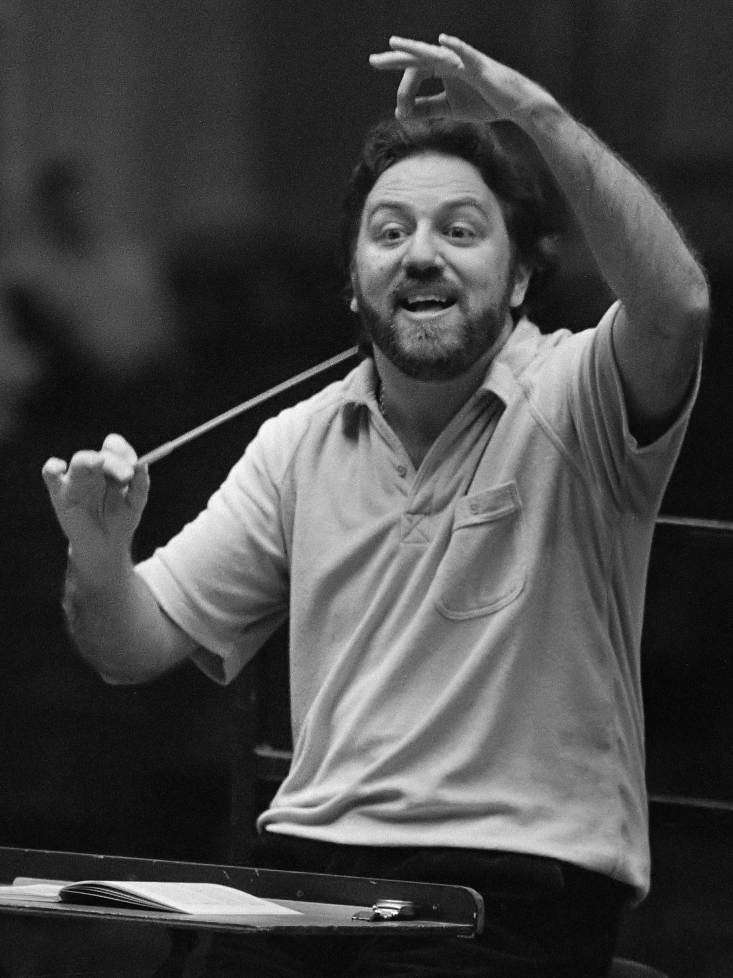 Toekomstig dirigent Riccardo Chailly van het Concertgebouworkest repeteert voor enige concerten met het Concertgebouworkest; Riccardo Chailly dirigeert 13 augustus 1986